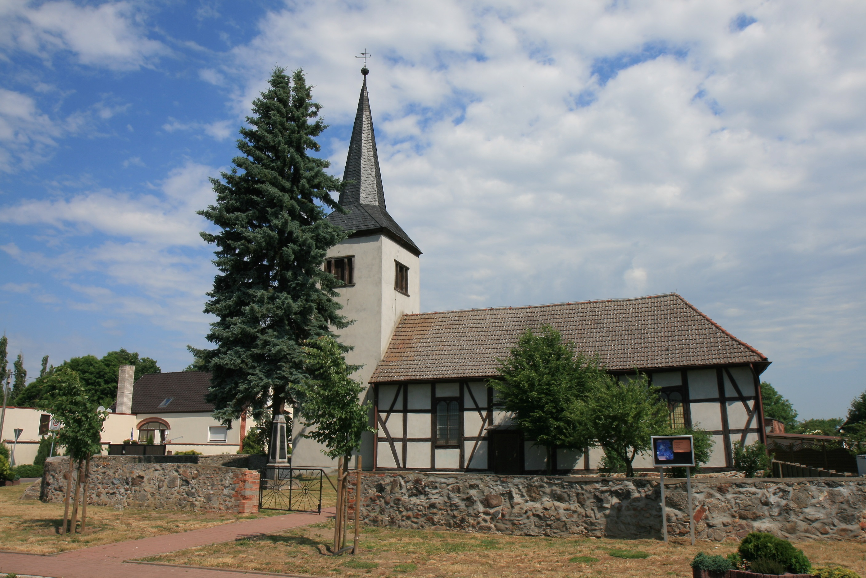 Evangelische Kirche in der Gemeinde Wenddorf.